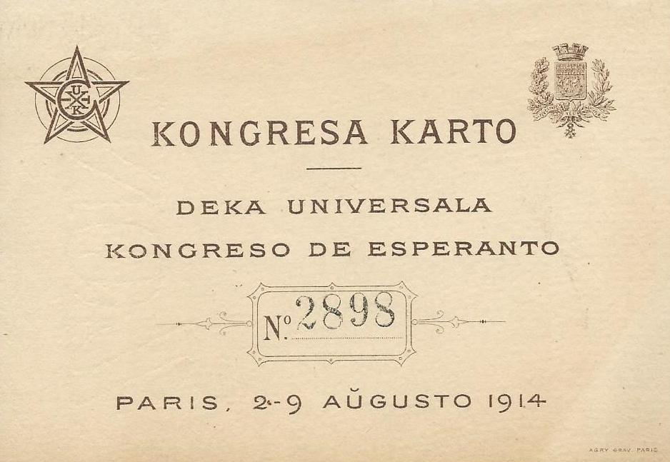 Kongreskarto de la Deka Kongreso de Esperantistoj (Parizo 1914 - en la FelixArchief de Antverpeno : 2233-414)